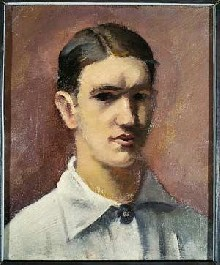 autoportrait de J.Grosvalds (1891-1920)